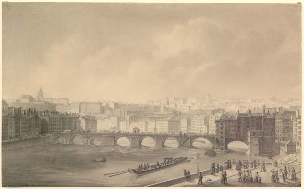 Edme-Camille Martin-Daussigny (1805-1878), Vue de l’ancien pont du change à Lyon, bâti en 1150, ruiné par l’inondation de 1840 et démoli en 1846. Dessiné à la mine de plomb par moi en 1846 d’une fenêtre de la maison située quai S. Antoine 36 au 3e étage. E. C. Martin-Daussigny (mention autographe au dos du dessin).